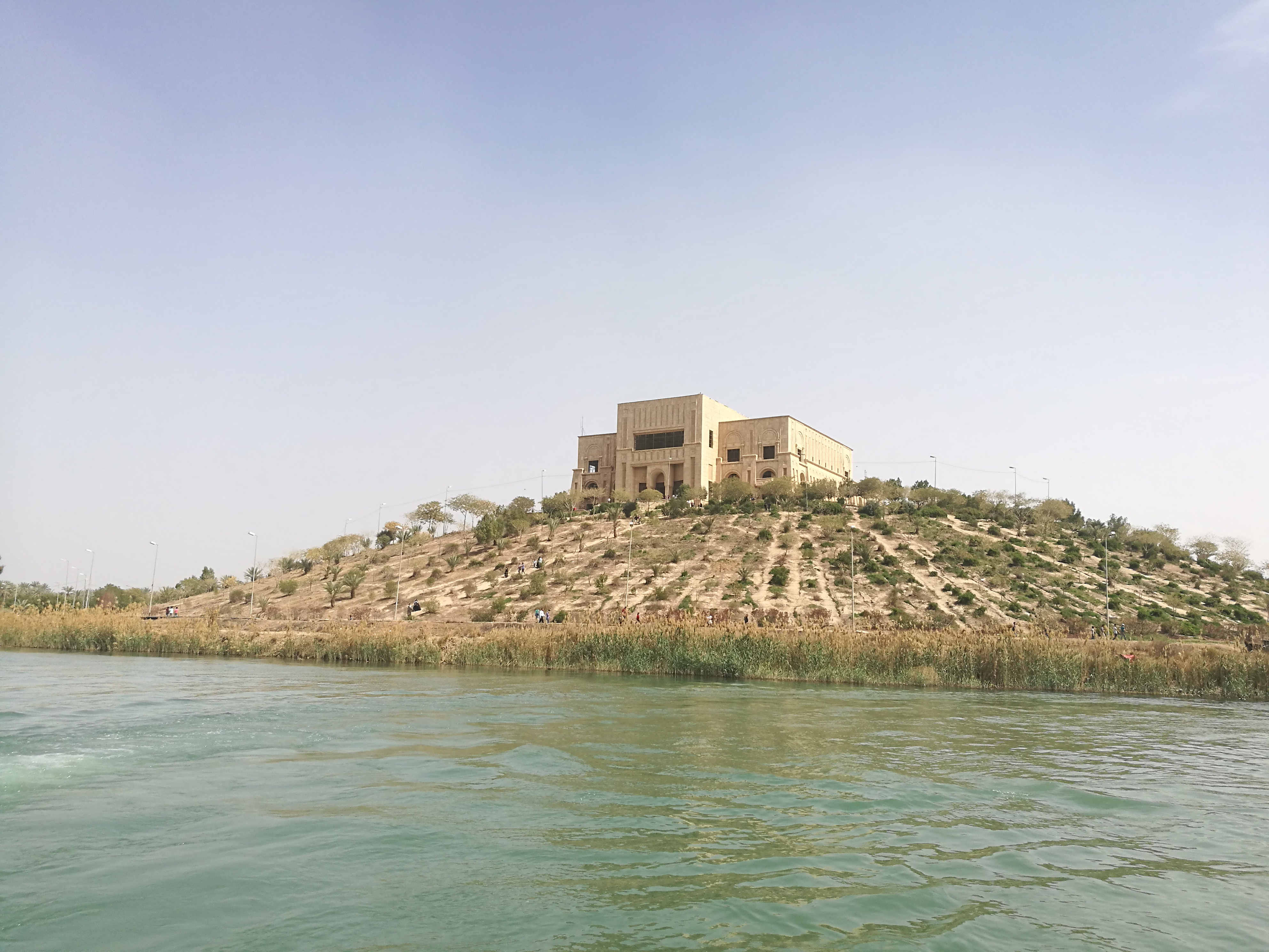 مبنى قصر الرئيس الراحل صدام حسين في بابل